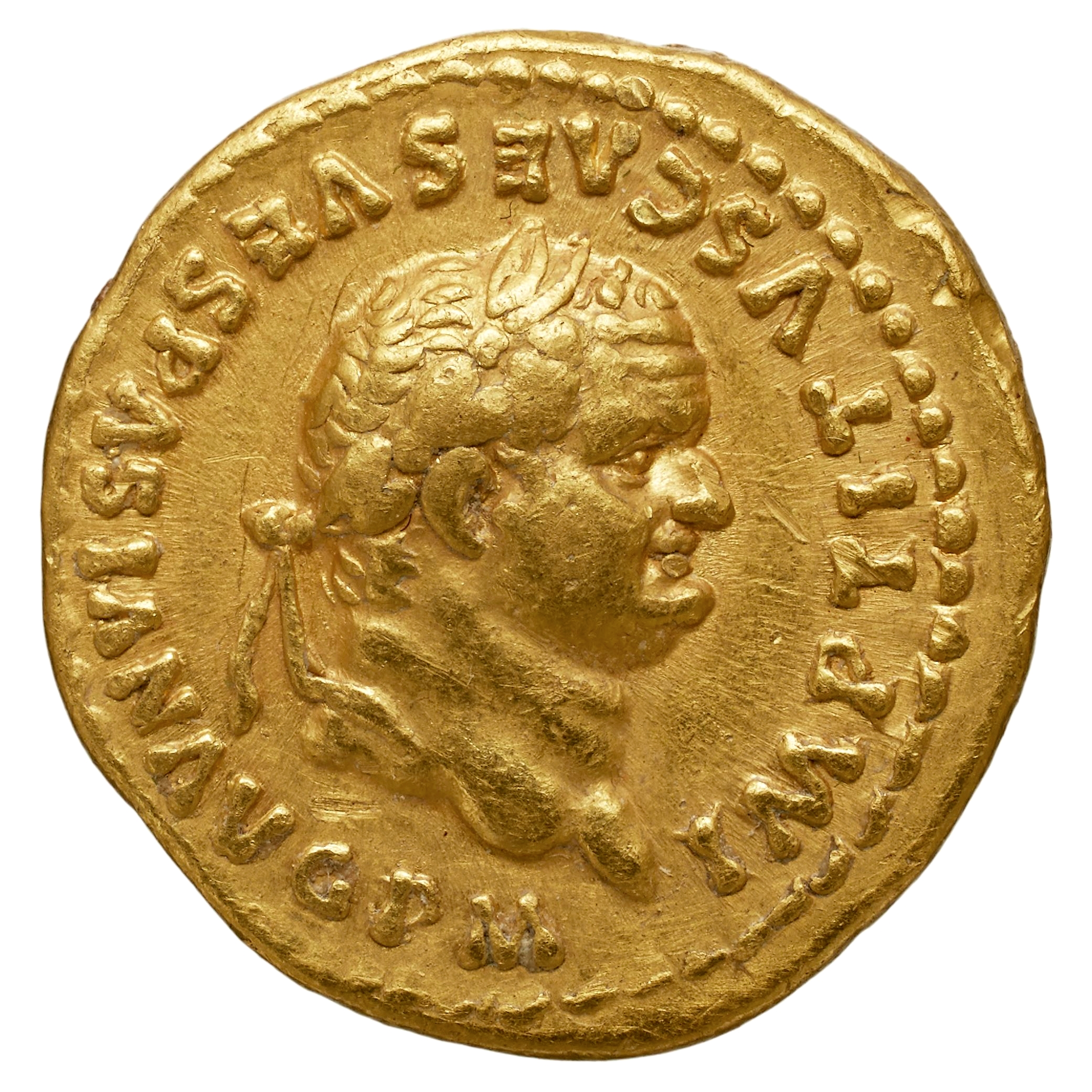 Aureus de Titus. Avers : IMP TITUS CAES VESPasia AUG PM Tête laurée de Titus à droite. Or, 7,34 gr. Rome, 80 ap.JC. Collection BnF : IMP-8432